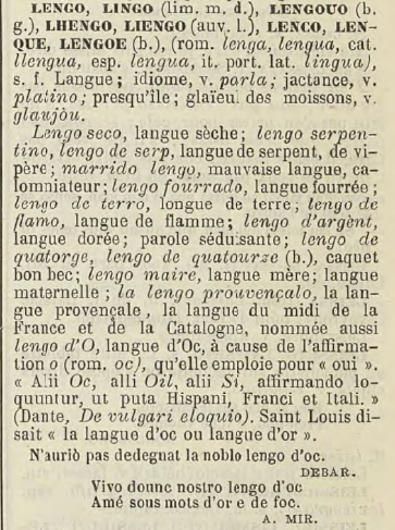 Entrée "lengo" du Trésor du Félibrigeː langue provençale ou langue d'Oc.